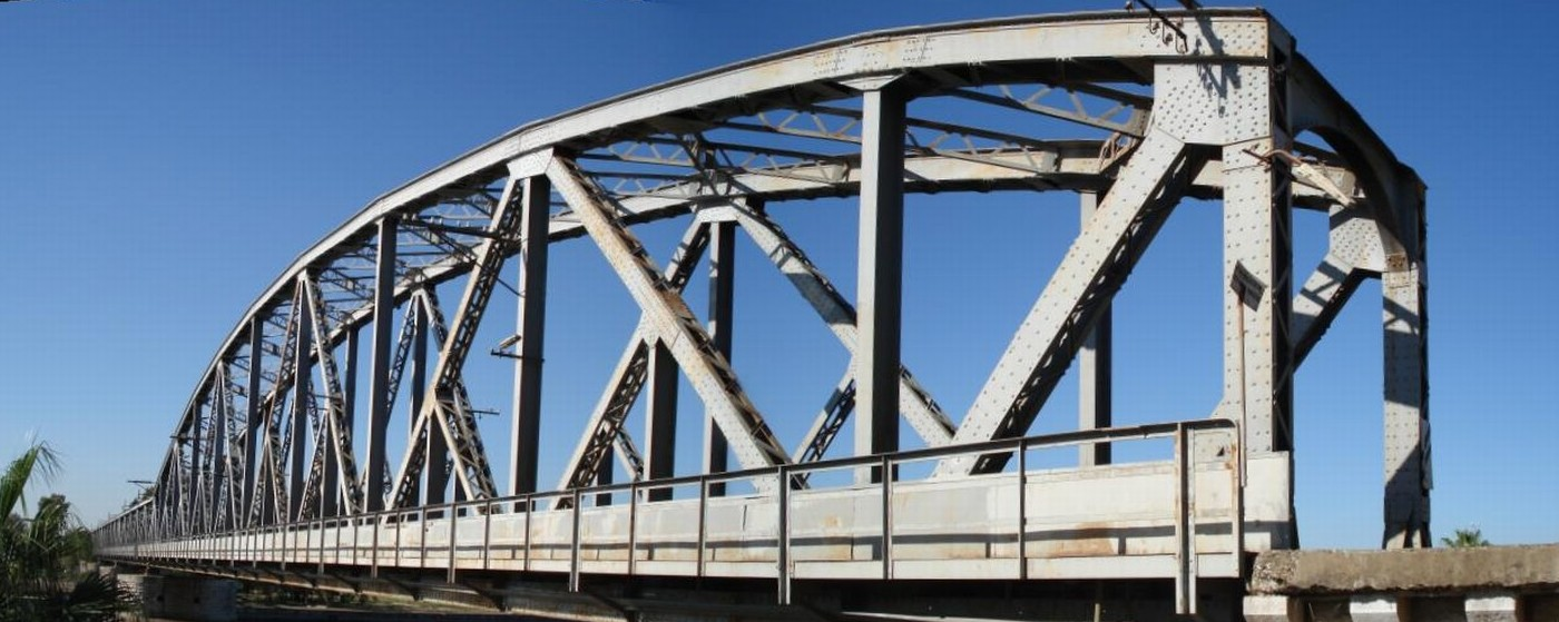 Adana'nın Seyhan ilçesinde bulunan Demirköprü.